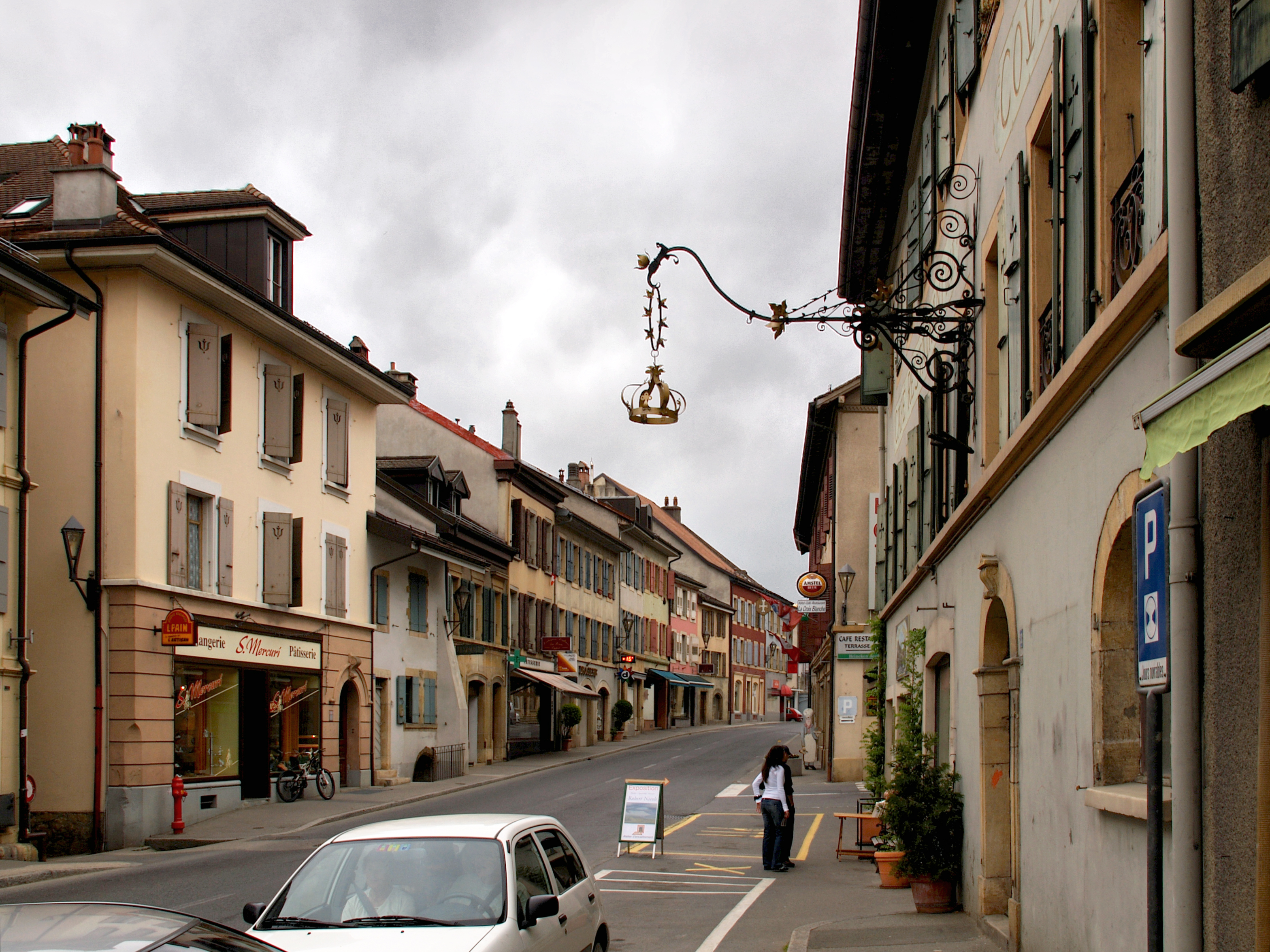 La Sarraz (Suisse) - La Grand-Rue